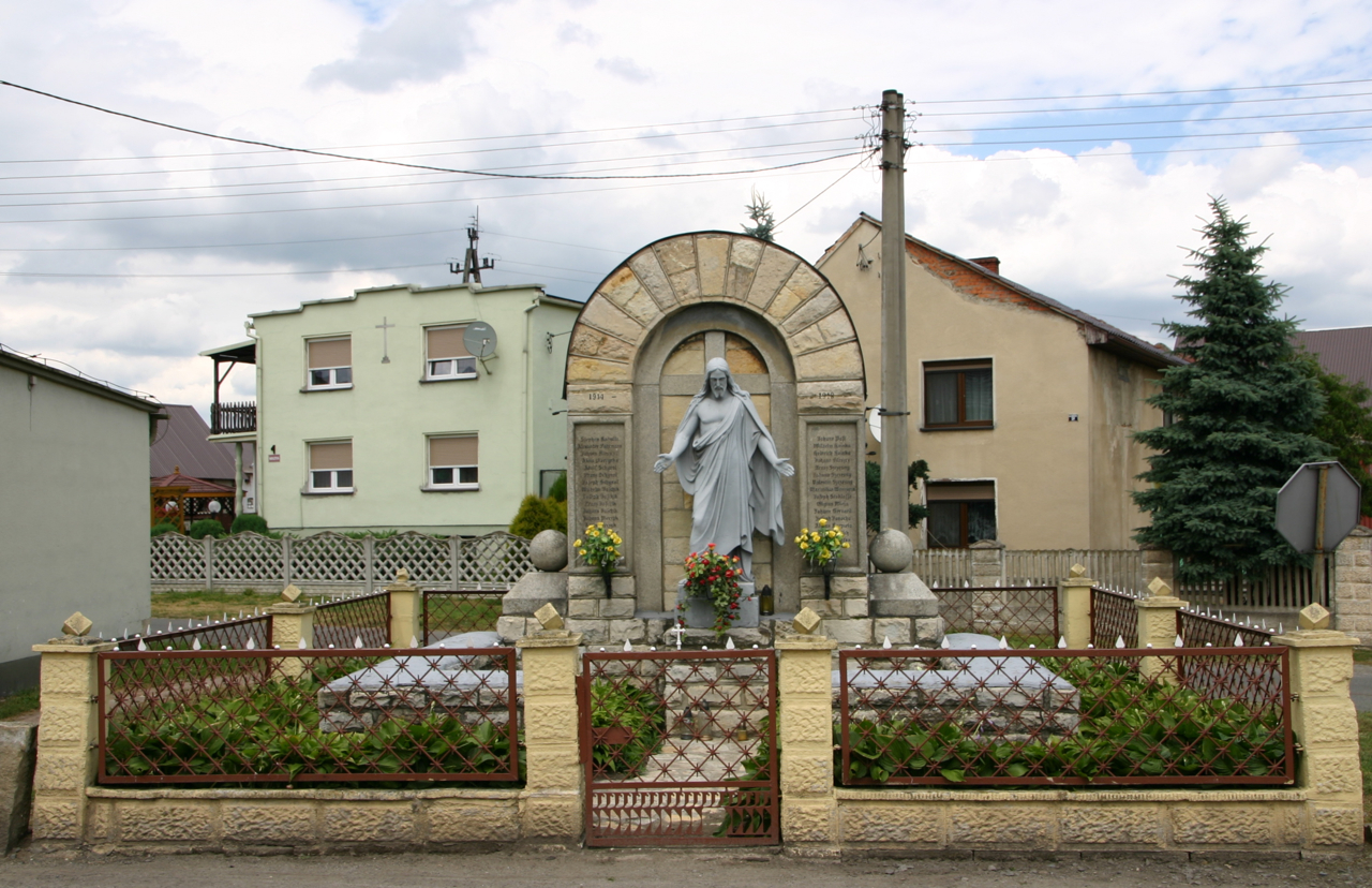 Grocholub (dodatkowa nazwa w j. niem. Grocholub) – wieś w Polsce położona w województwie opolskim, w powiecie krapkowickim, w gminie Walce.